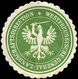 Sealing stamp Title: Westpreussische General - Landschaftsdirection Description: grün, weiß, geprägt Place: Danzig size: 4 cm